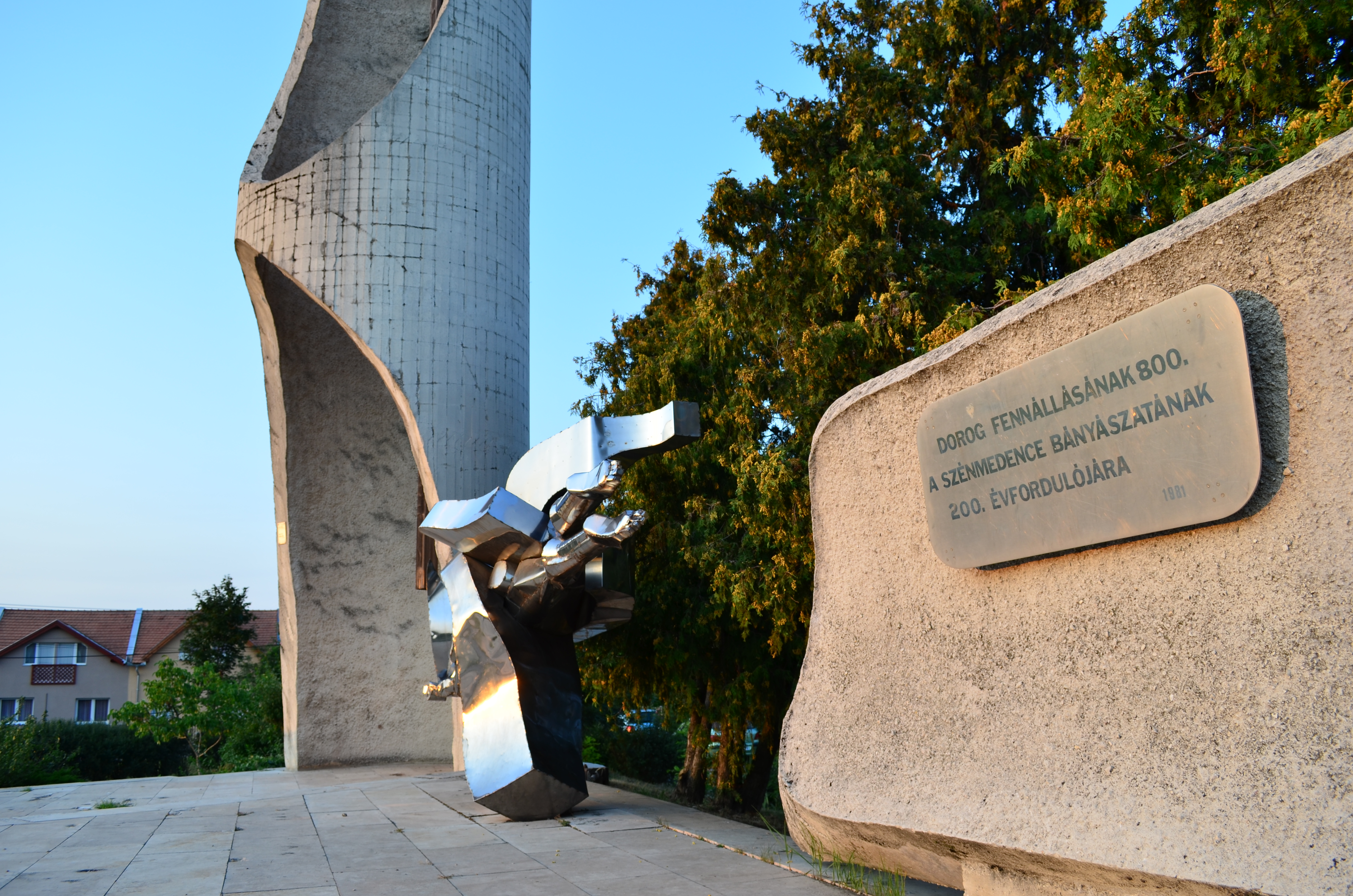 A dorogi jubileumi bányászemlékmű.